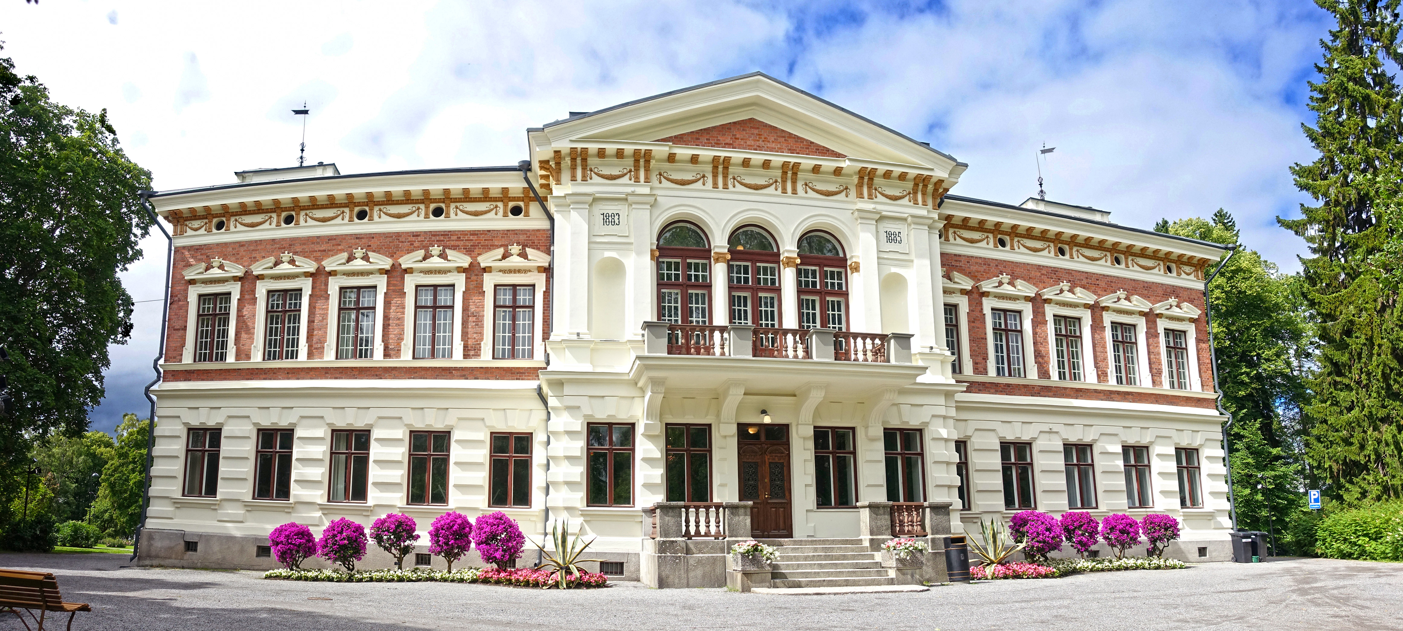 Hatanpään kartano Tampereella.